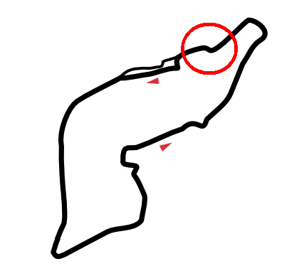 Variante Bassa nel circuito di Imola nel 1994